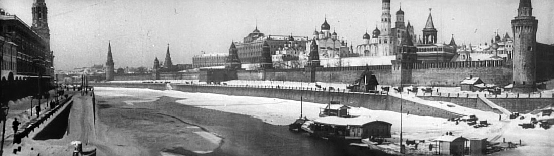 Обзор Кремлевской набережной со стороны Большого Москворецкого моста. Влево от Беклемишевской (Москворецкой) башни можно увидеть: Вознесенский собор Вознесeнского женского монастыря, взорванный в 1929 г.; купола церкви Константина и Елены на подоле в Тайницком саду, снесенной в 1928 г.; памятник императору Александру II на холме, уничтоженный в 1918, а его постамент – в 1920-х.; Тайницкая башня с отводной стрельницей, с которой до 1917 г. каждый день в полдень стреляла пушка. Стрельницу в очередной раз разобрали в 1930–33 гг., тогда же были заложены проездные ворота и засыпан колодец.